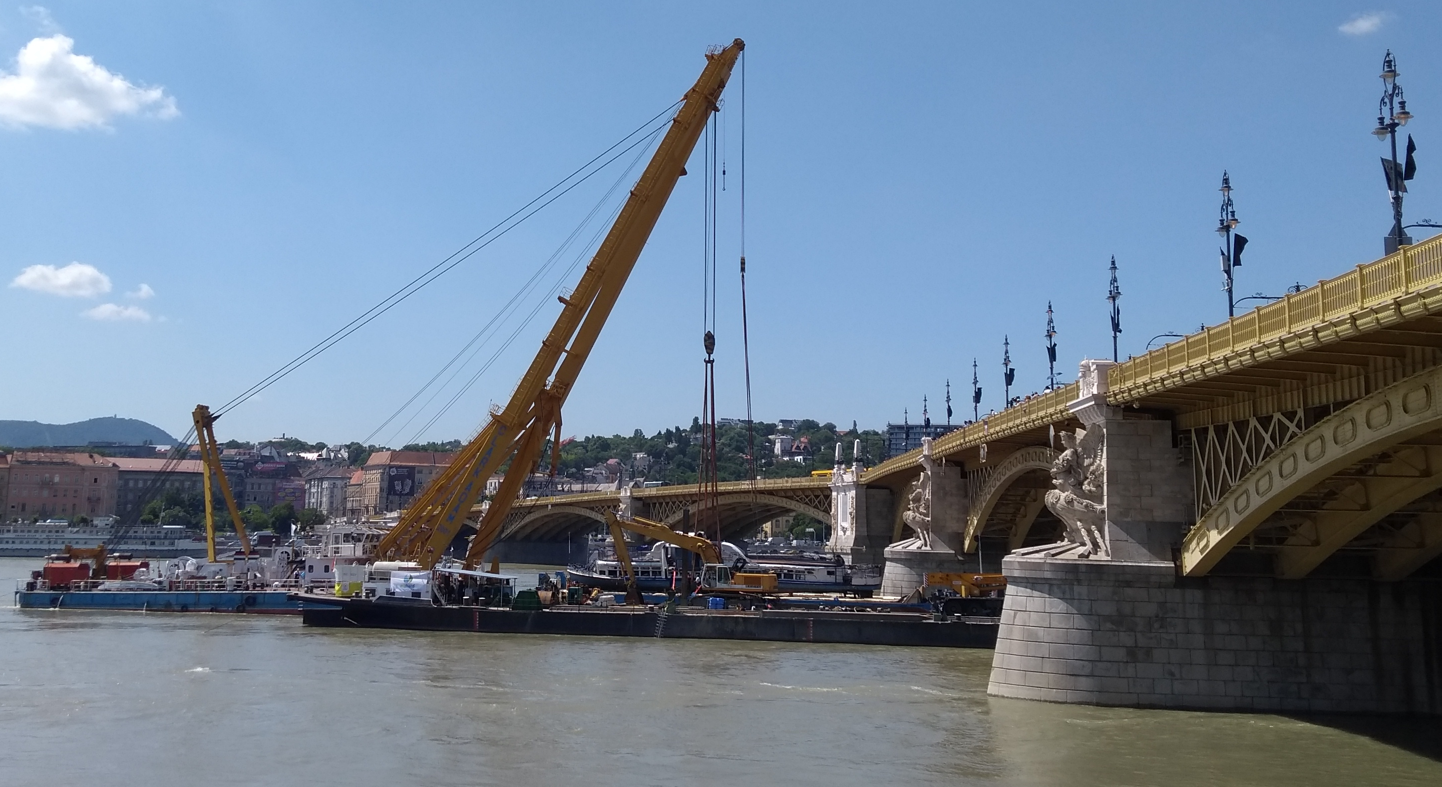 2019 június 11 14:08:05 A kiemelt Hableány roncsa